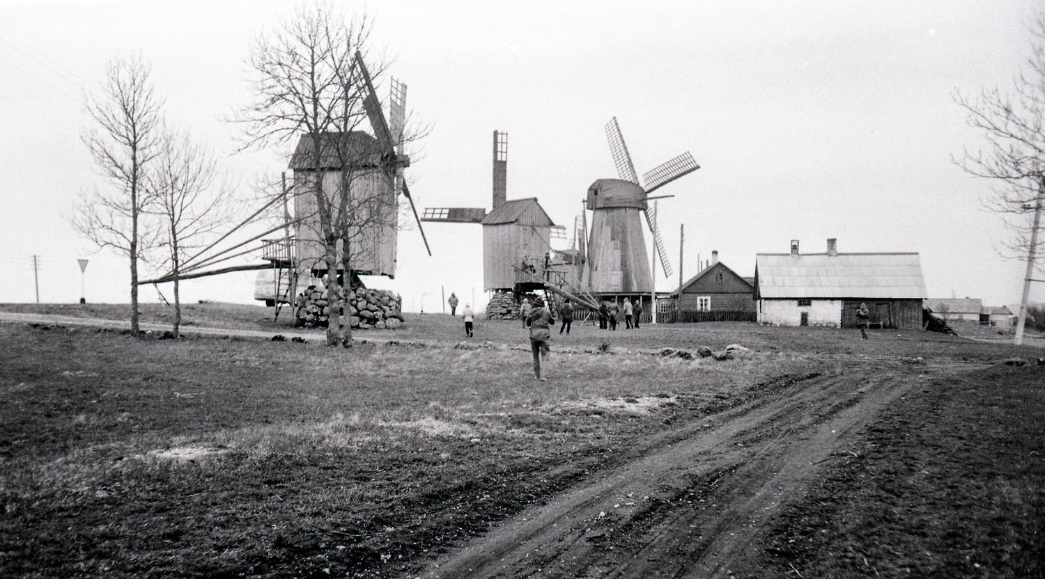 Angla tuulikud 74 (01)